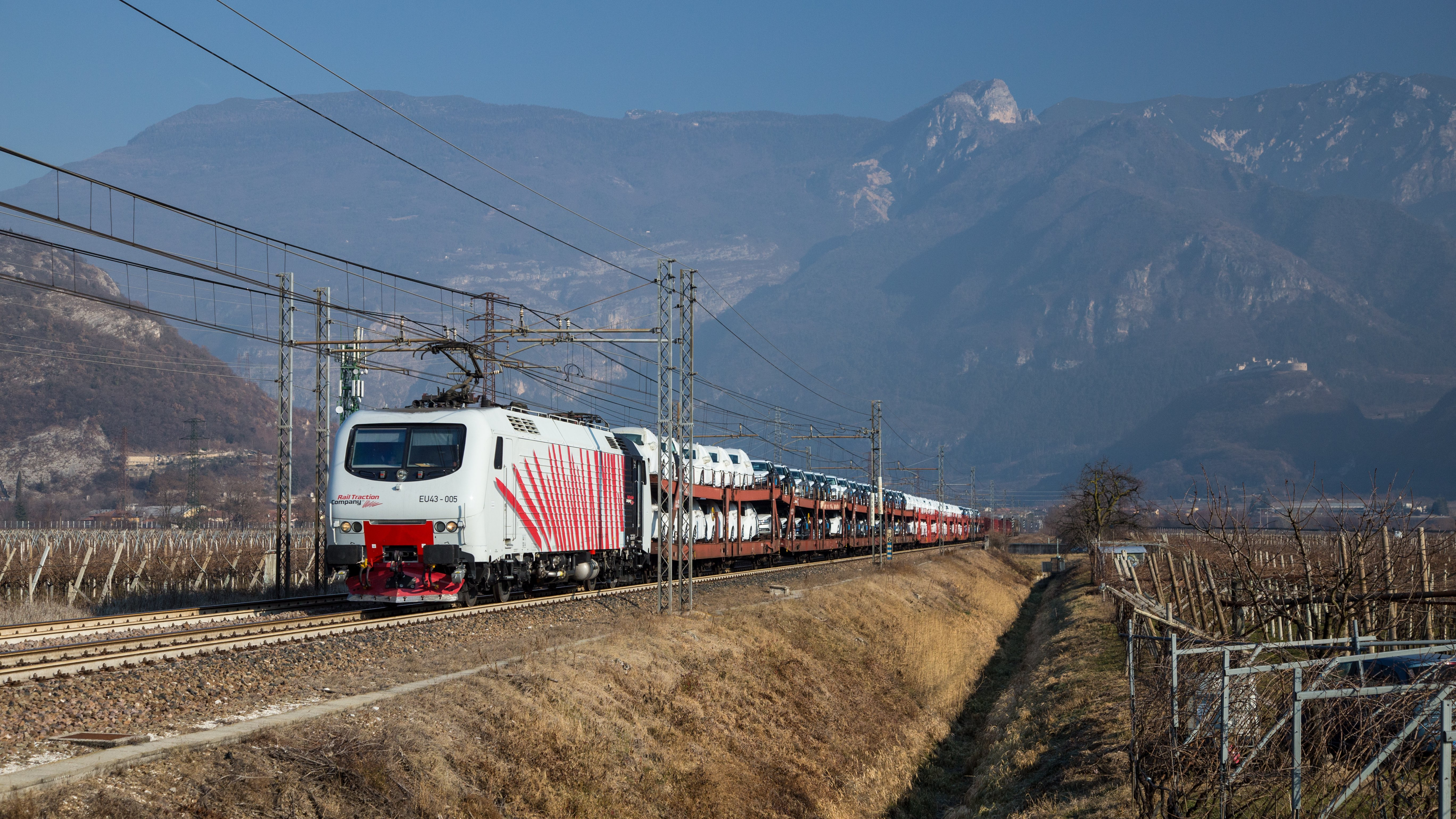 Treno merci scende da Brennero, in transito a Trento.